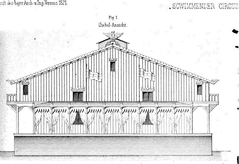 Das Zirkusschiff des schwimmenden Rheinzirkus Lent (Giebelansicht)